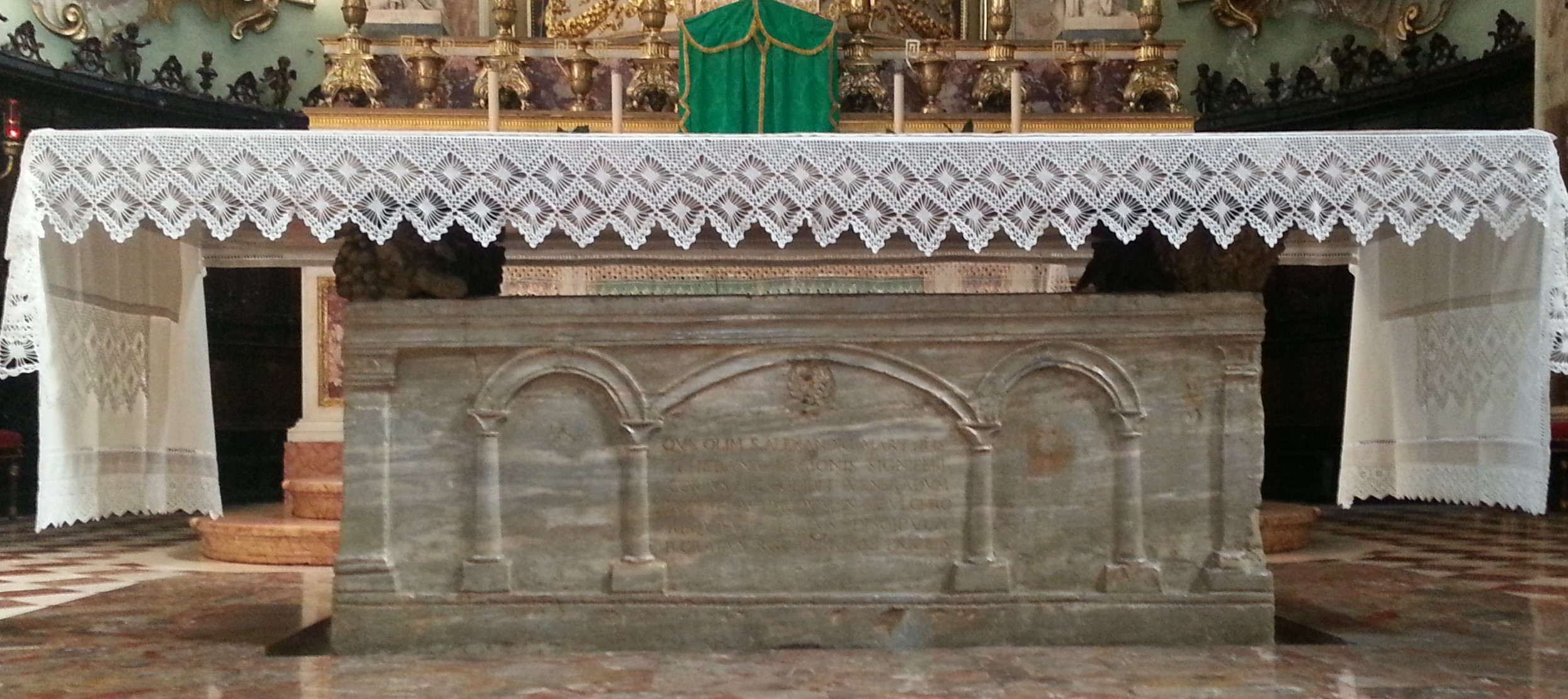 Altare realizzato con la prima pietra tombale di s.Alessandro